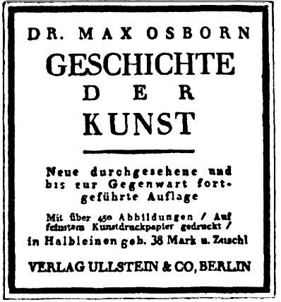 Buchtitel Max Osborn, Werbeanzeige in der Vossischen Zeitung vom 5. Januar 1921